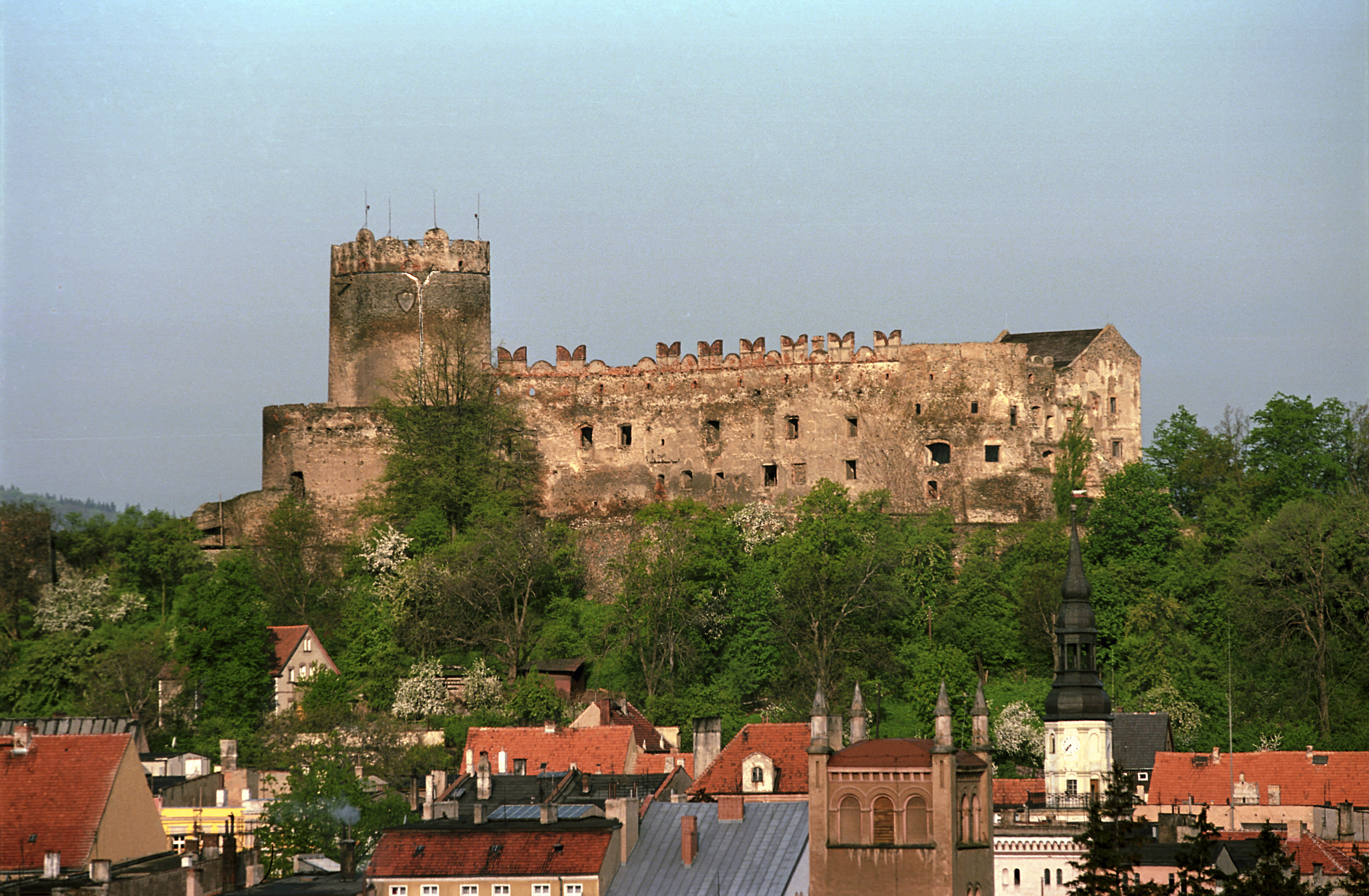 Poland, Bolkow Castle